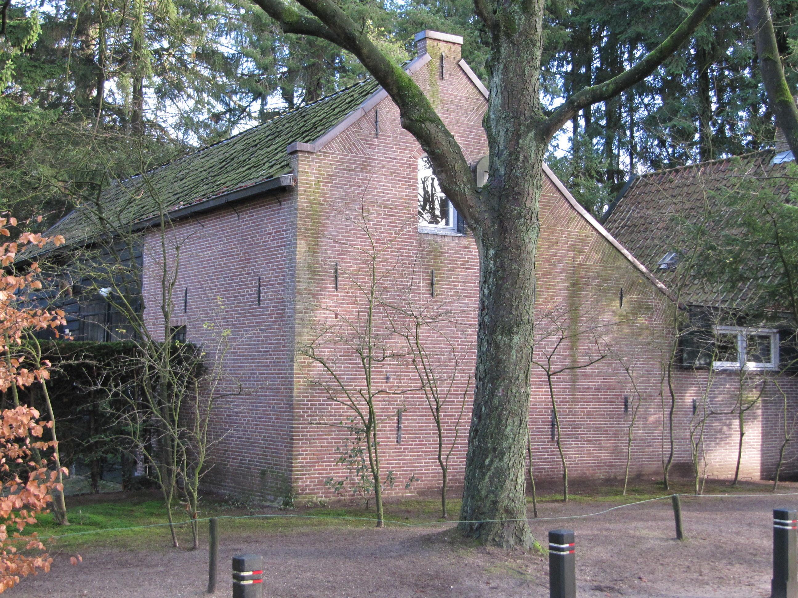 RM515735 Lage Vuursche.jpg